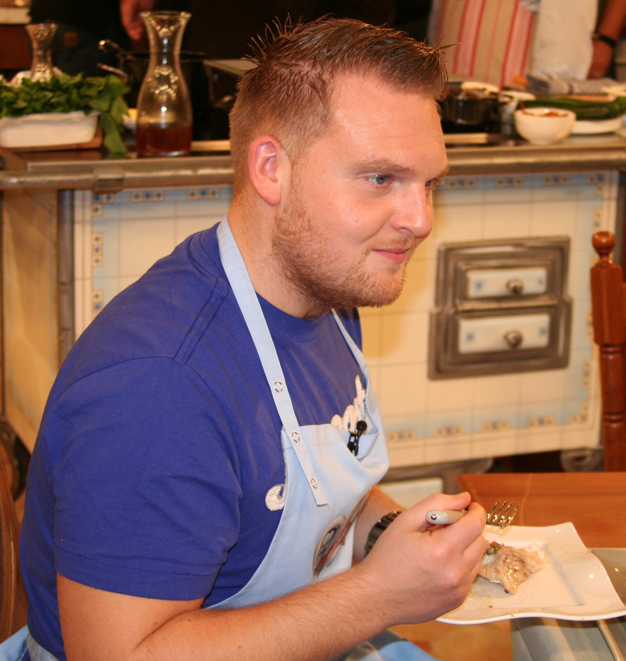 Axel Stein bei der Aufzeichnung Lafer! Lichter! Lecker!mit Eleonore Weisgerber